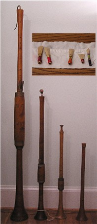 eigen foto mrt toestemming eigenaars instrumenten, pommers met rieten